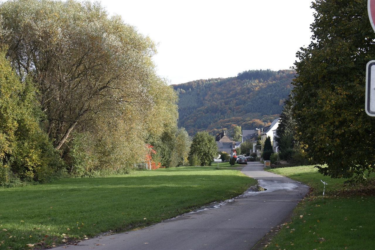 Ehemaliges Betriebsgelände (links) und Standort des Bahnhofs (rechts) in der heutigen Bahnhofstraße zwischen Lösnich und Kindel.